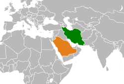 Térkép